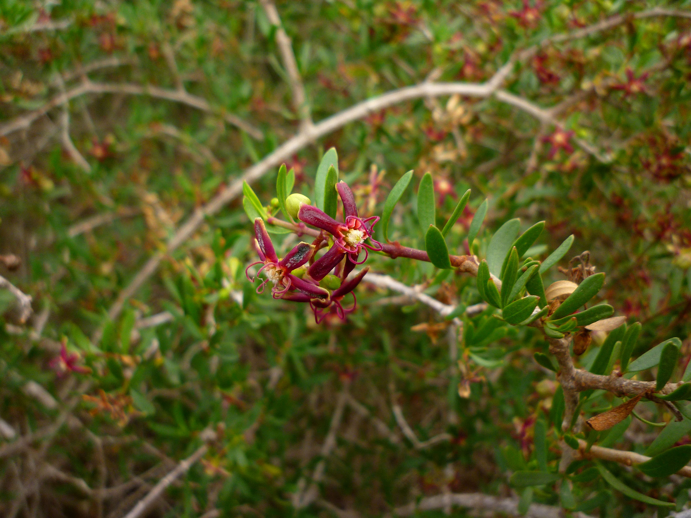 Periploca angustifolia en la Sierra de la Muela, Cartagena, España.